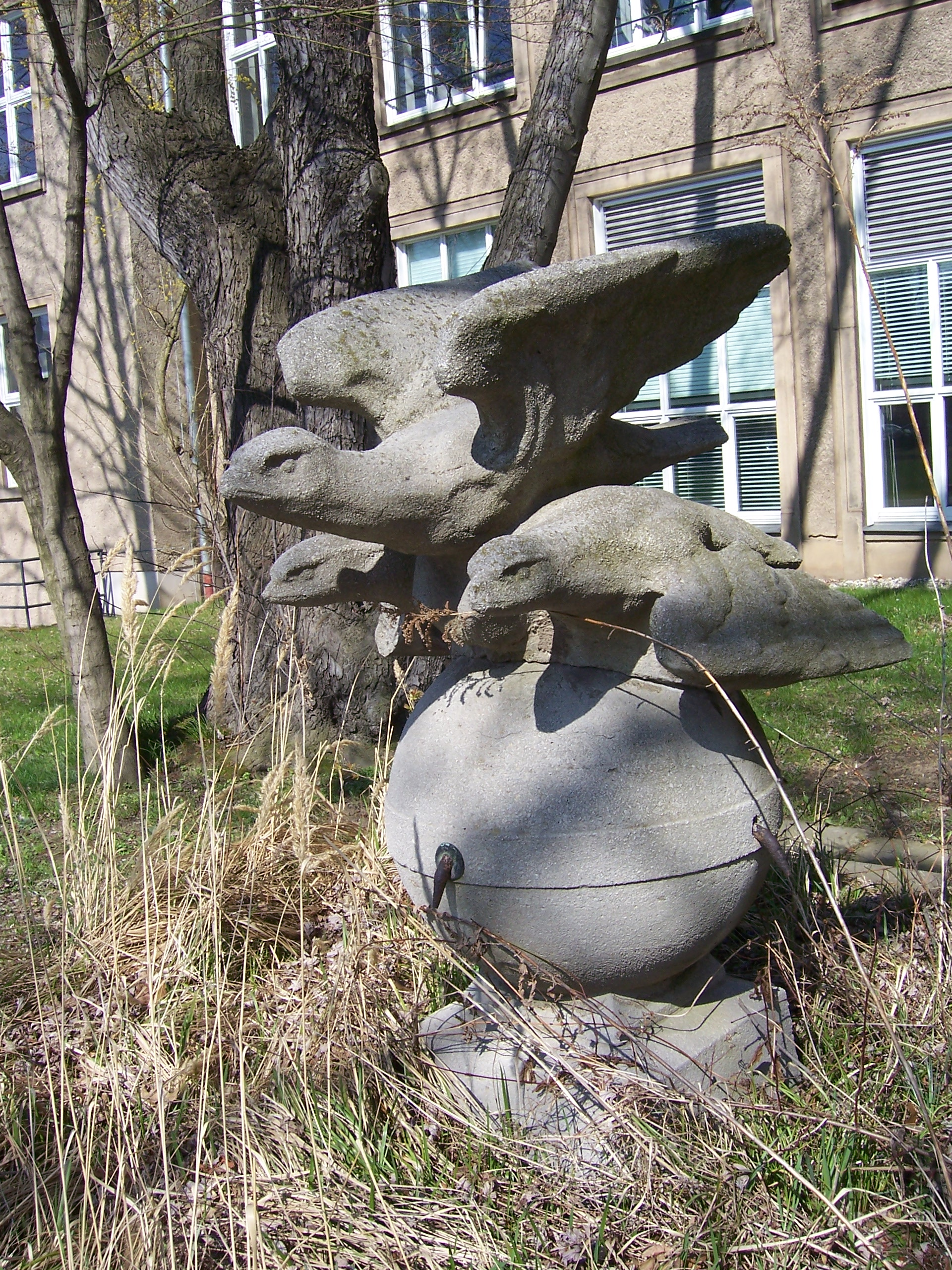 Flügelradbrunnen auf der Hettnerstraße, TU Dresden